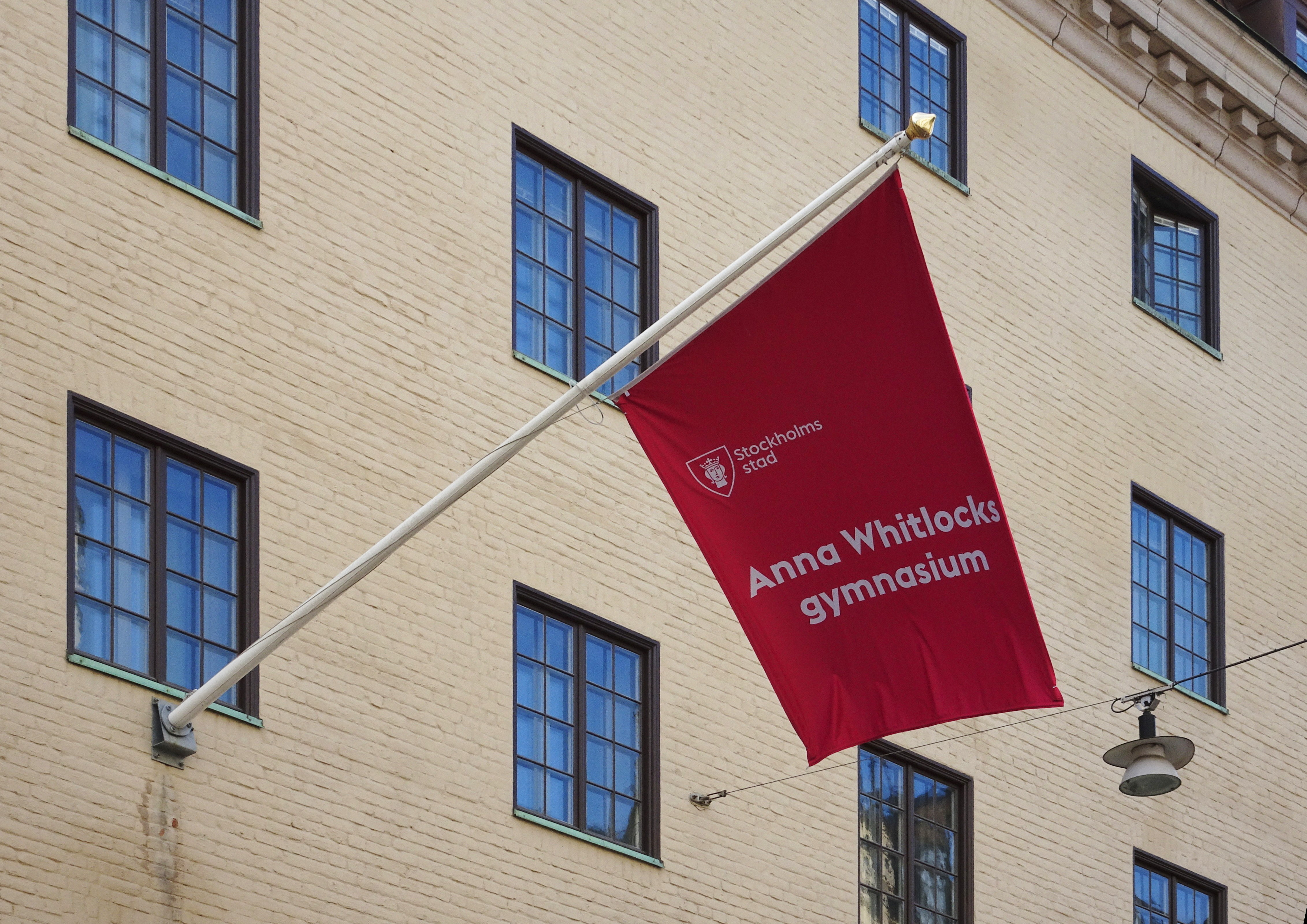 Anna Whitlocks Gymnasium, Hantverkargatan 29, f.d. Ämbetshuset (fastigheten Murmästaren 3)